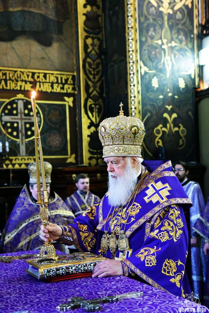 патріарх Філарет служба у піст